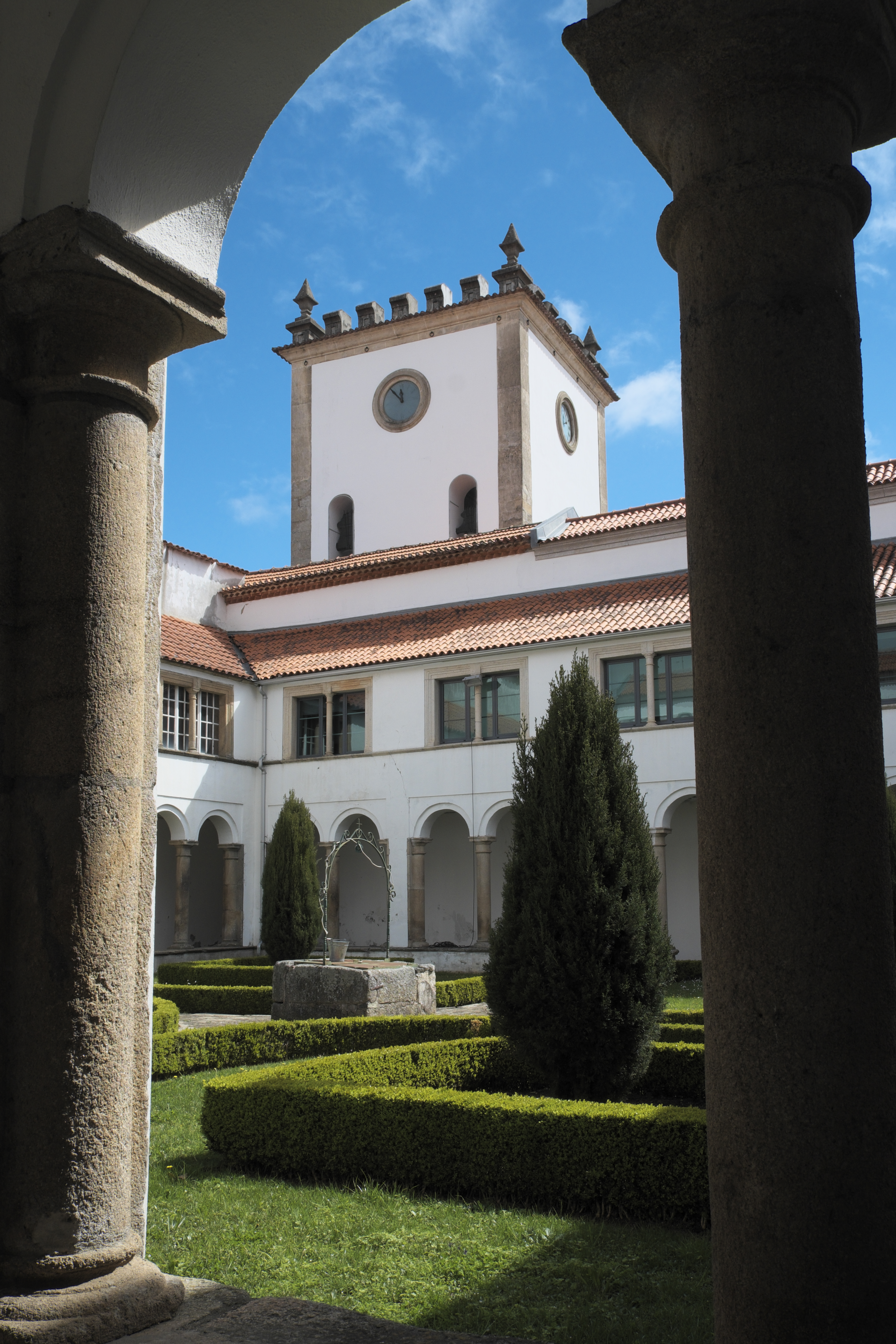 Alte Kathedrale Sé Velha (São João Batista), ehemalige Kirche des Klarissenklosters, in Bragança in Nordportugal, Kreuzgang